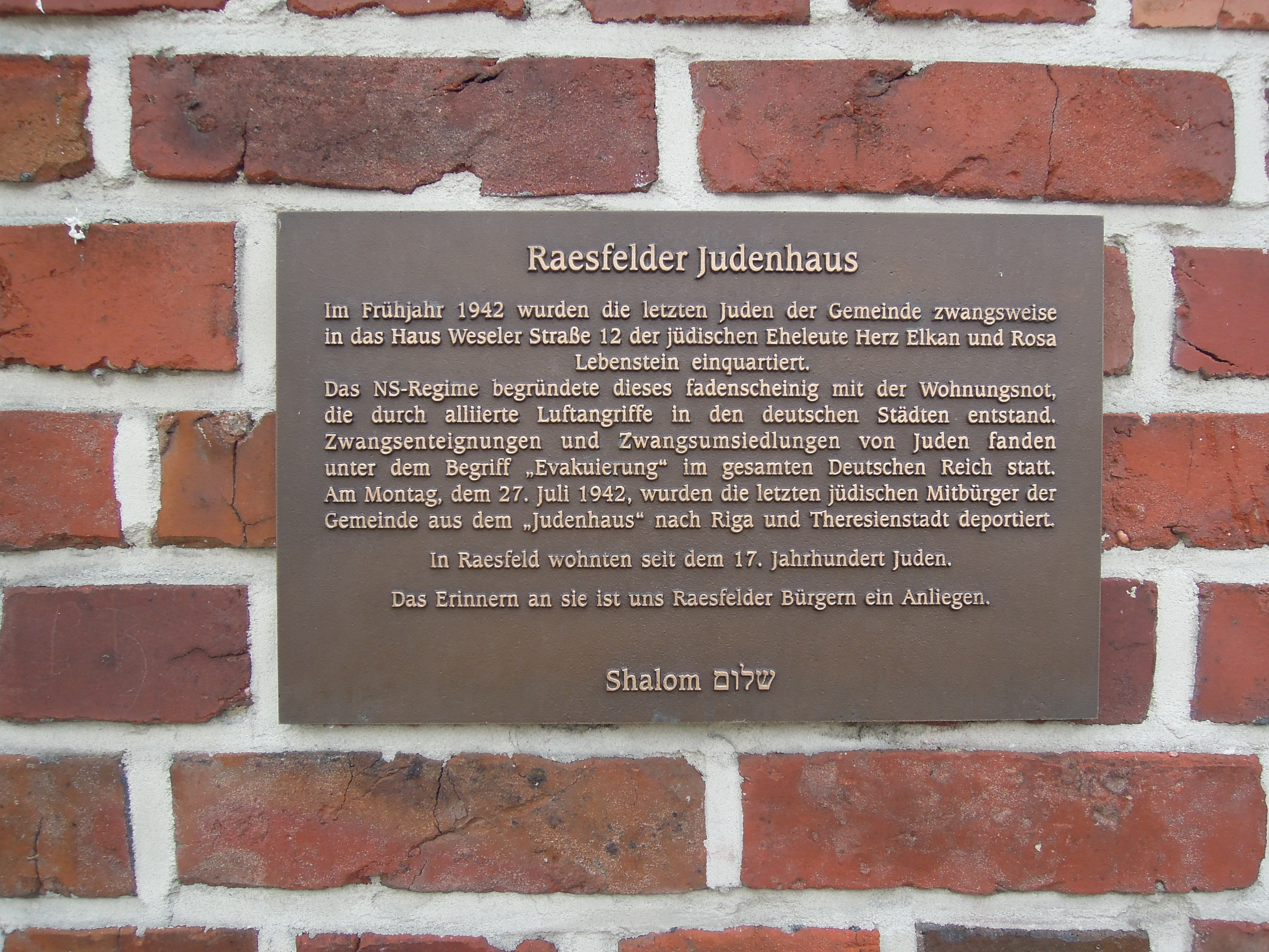 Gedenktafel Raesfeld Weseler Straße 12 Raesfelder Judenhaus